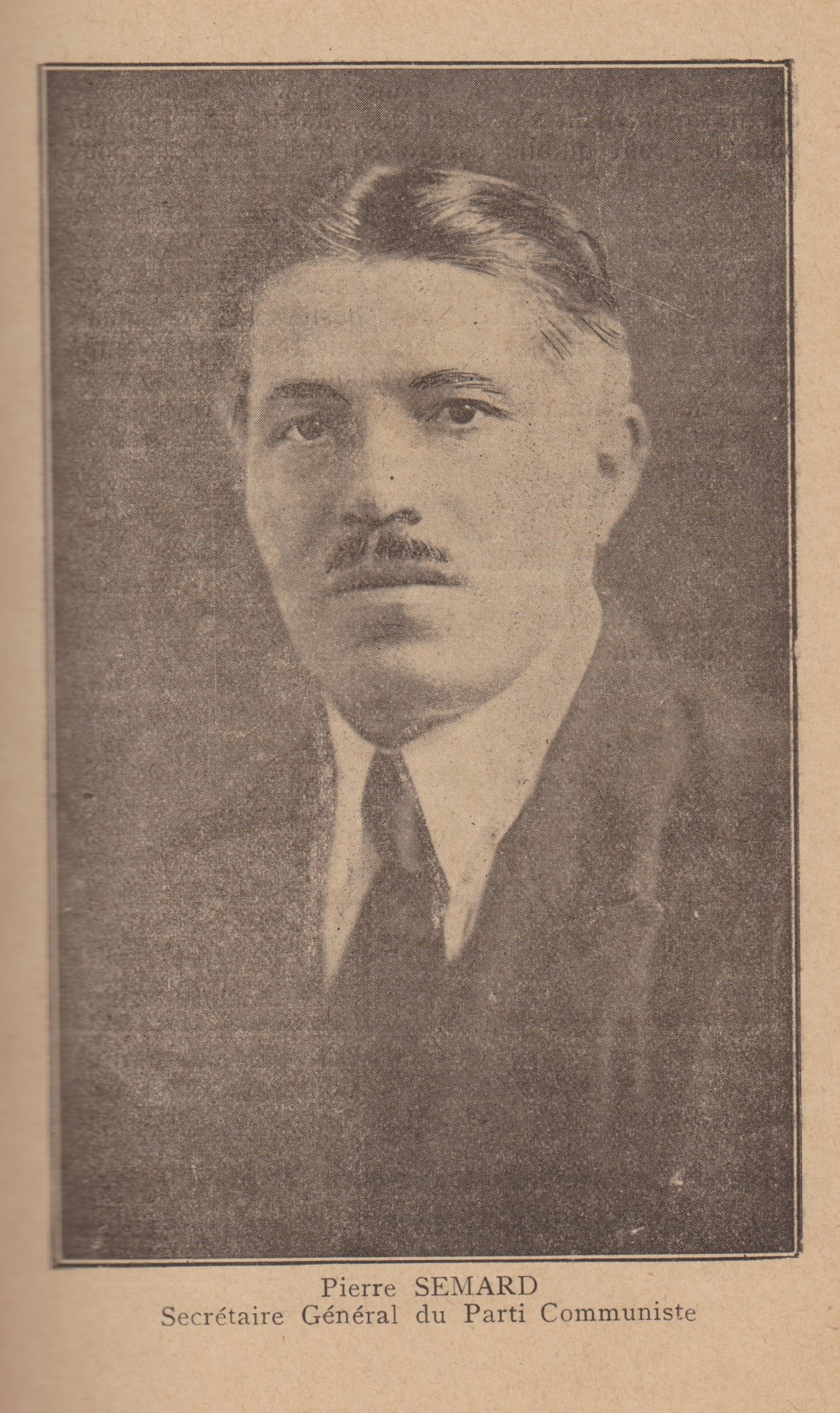 Photo publiée dans L'Almanach bolchévique pour 1925, éditée par la librairie du Parti communiste, en vente à la librairie de l'Humanité, 120, rue Lafayette, Paris Xe.